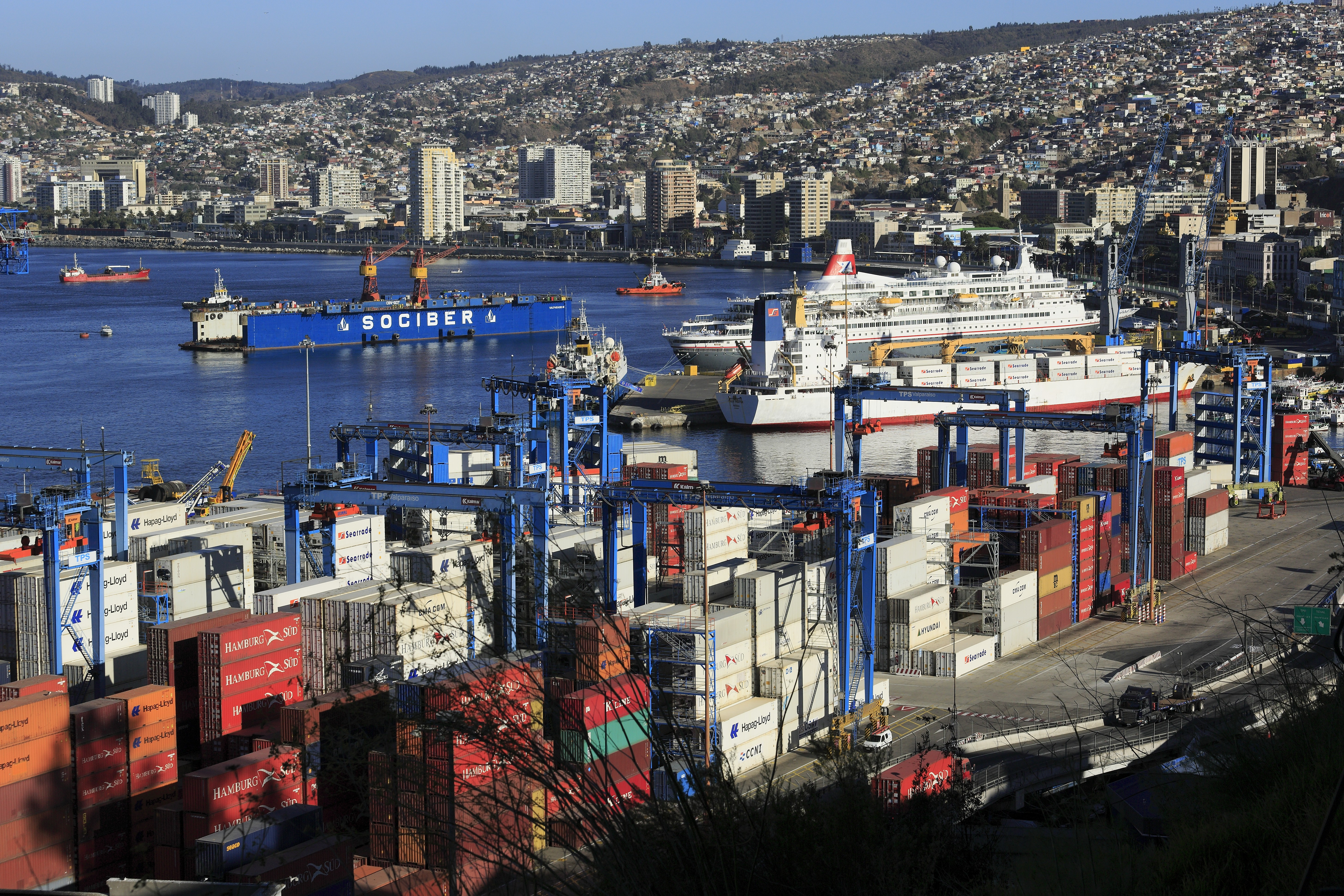 Vom Paseo 21 de Mayo, im Vordergrund der Contaínerumschlagplatz mit neun Kockums-Portalkranen. dahinter die zusätzliche Pier mit drei Liegeplätzen, links das Schwimmdock Valparaíso III, im Hintergrund liegt die Küstenstraße Avenida Errázuriz. Oberhalb der schmalen Ebene »El Plan« mit großstädtischer Bebauung ziehen sich die Wohnviertel die Hänge hinauf.